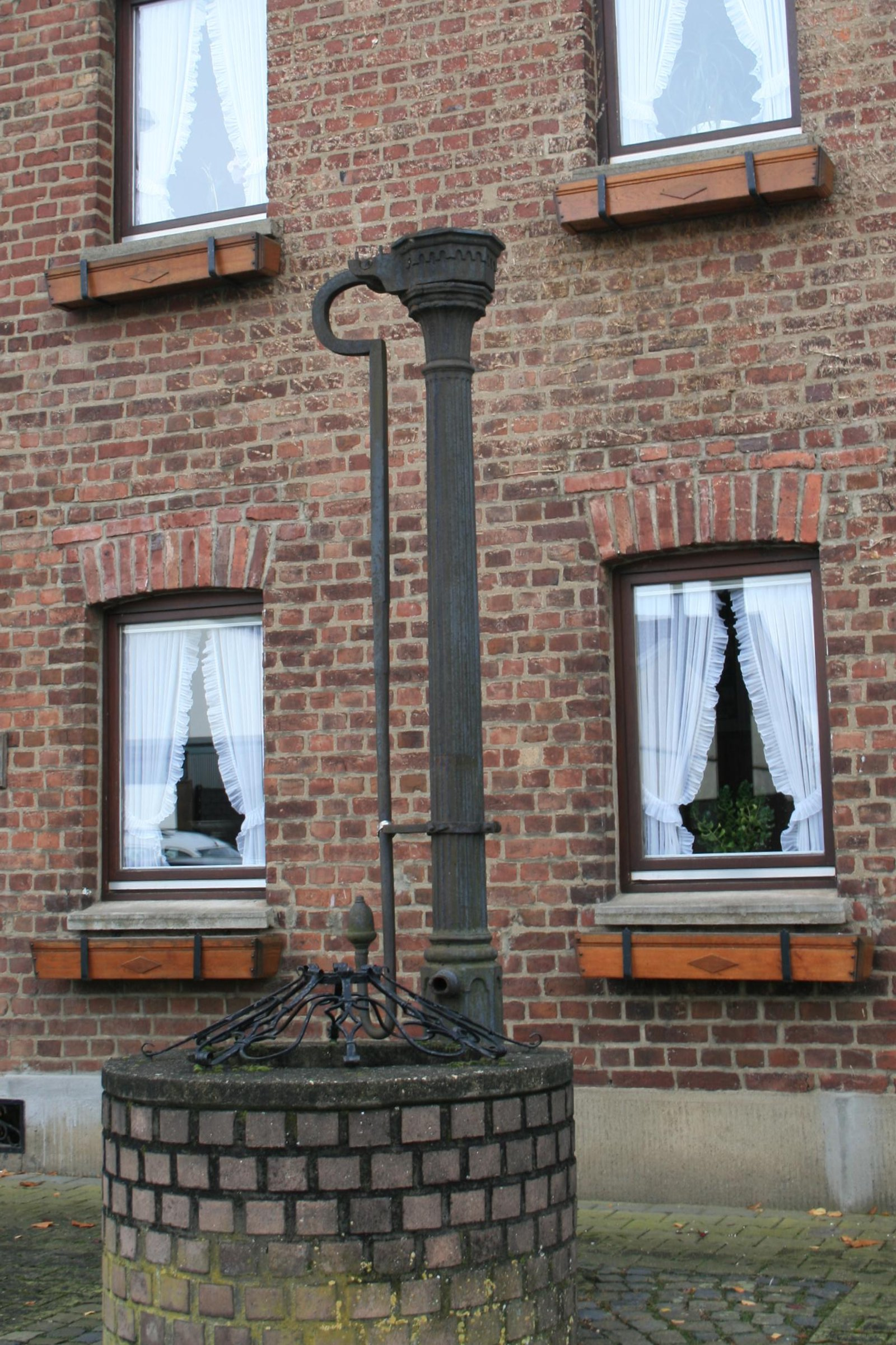 Eine der Dorfwasswerpumpen in Nörvenich-Eschweiler über Feld vor Haus Heribertstr. 13